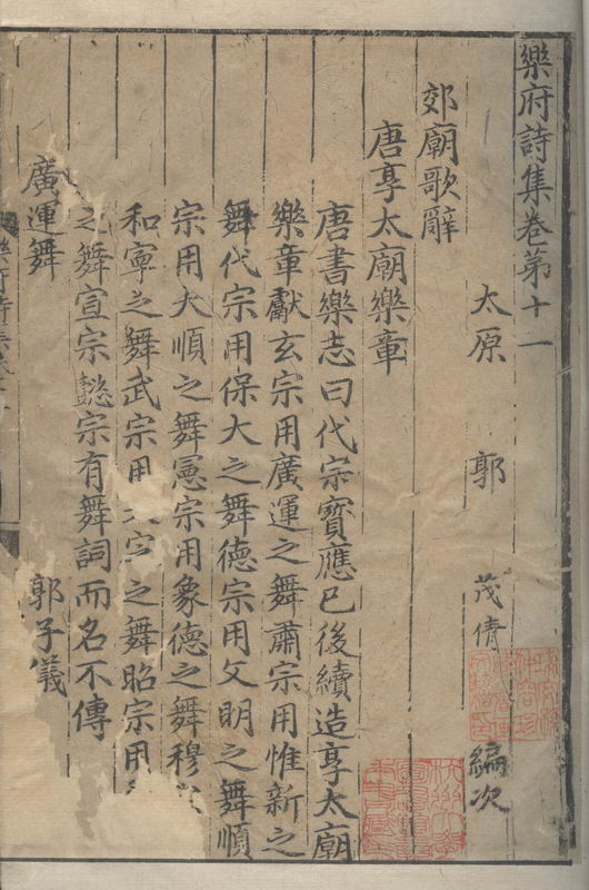 乐府诗集一百卷 （宋）郭茂倩辑